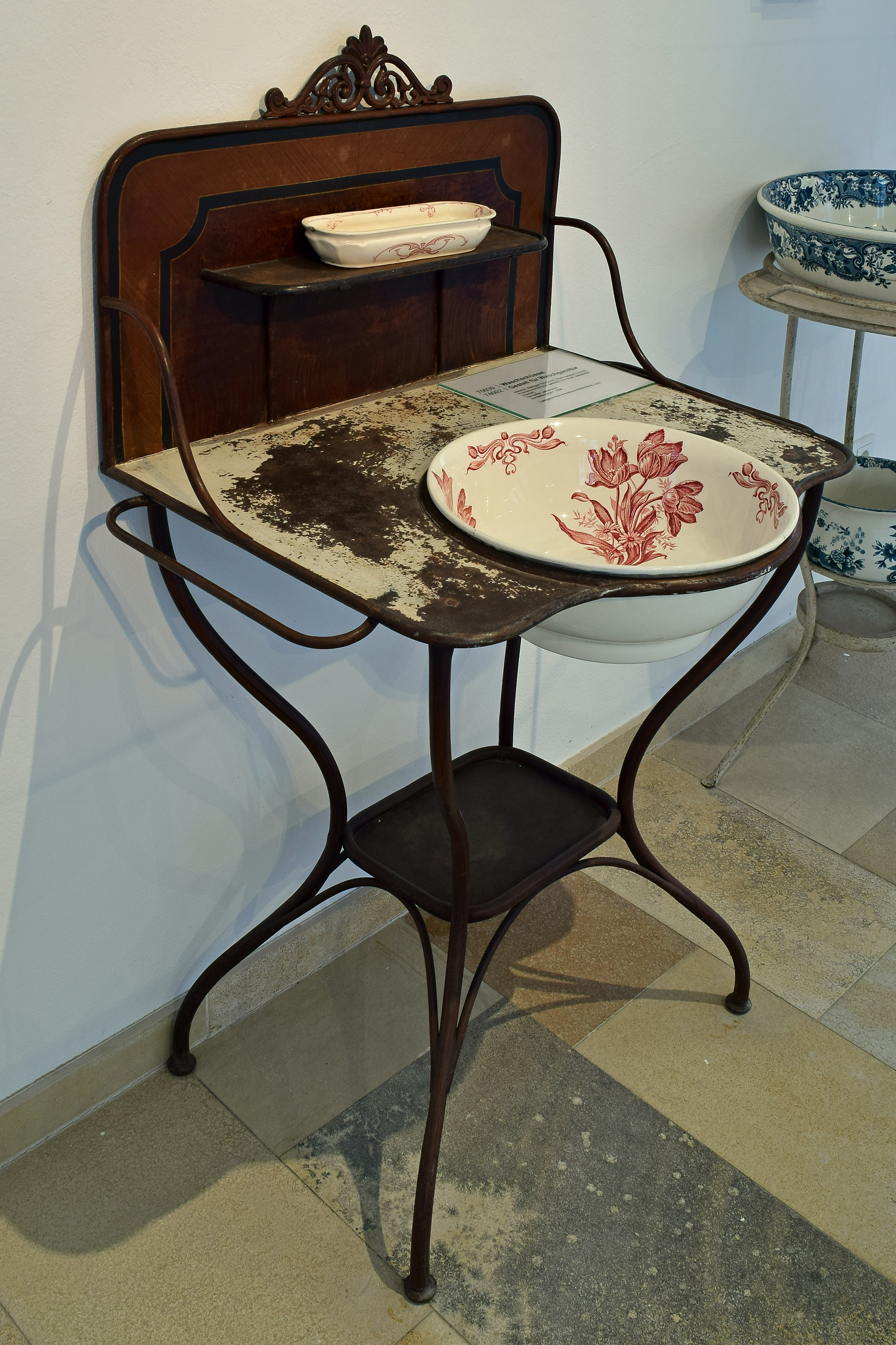 Ausstellungsstück im Museum für historische Sanitärobjekte im Kammerhof, Gmunden